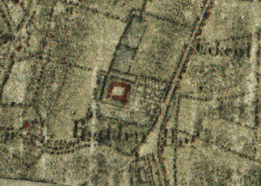 Abbildung des Gutes Bodenhof in Aachen auf der Tranchotkarte